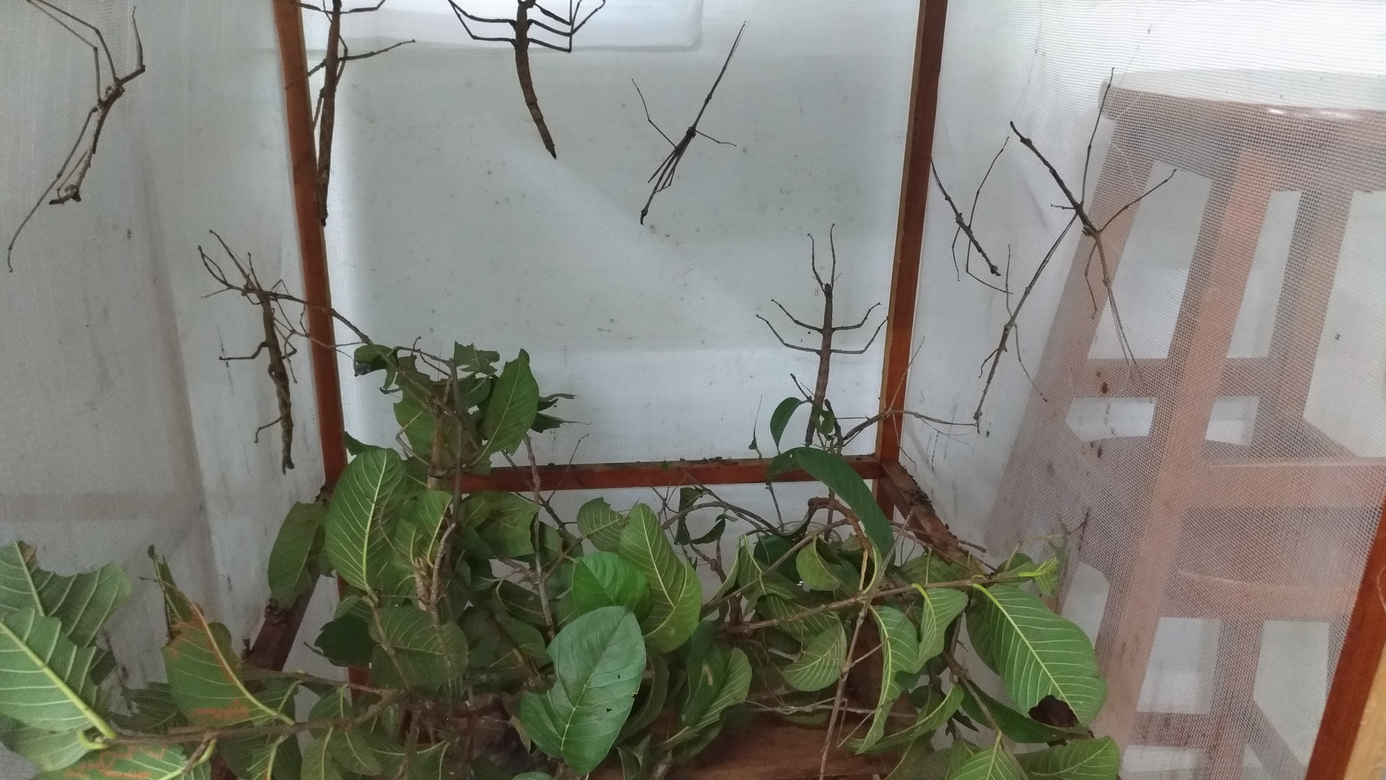 Criação de Phasmatodea do gênero Cladomorphus. Essa coleção faz parte da Estação Biologia do Instituto de Biocências da Universidade de São Paulo(USP)